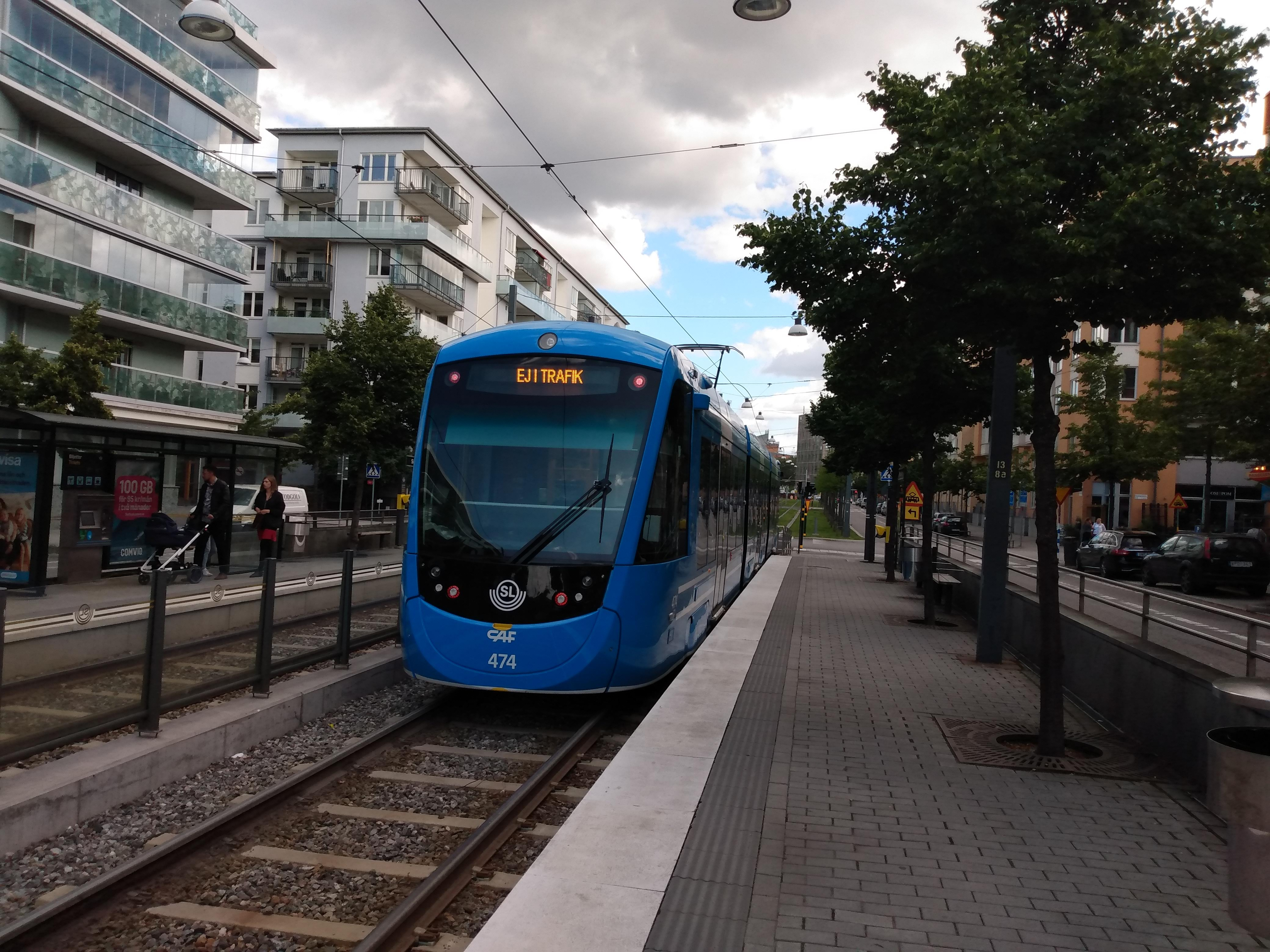 A35 474 under provkörning i Sickla Udde på Tvärbanan